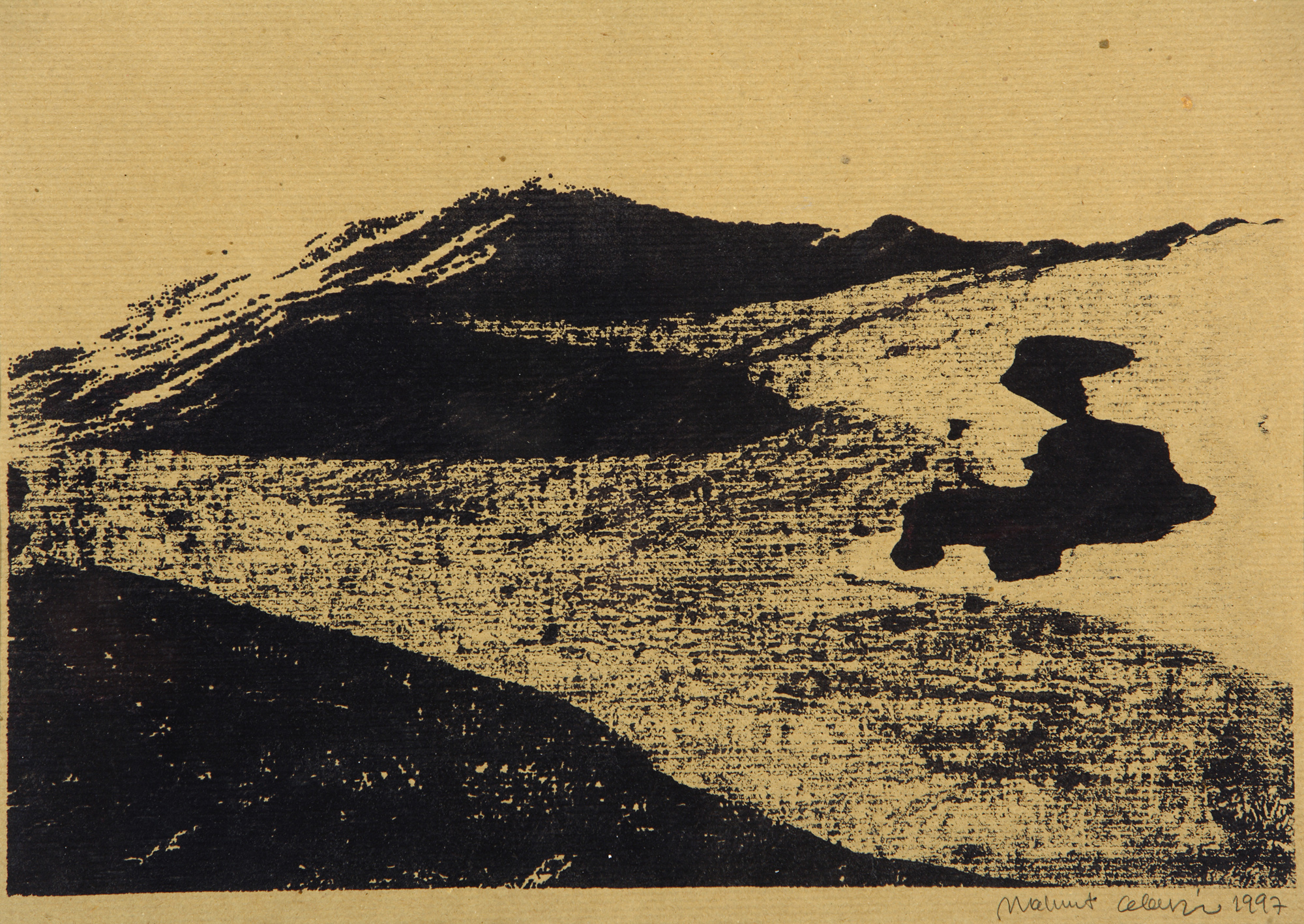 Die Seidenstrasse IV, Monotypie, 32 x 42 cm, 1997.